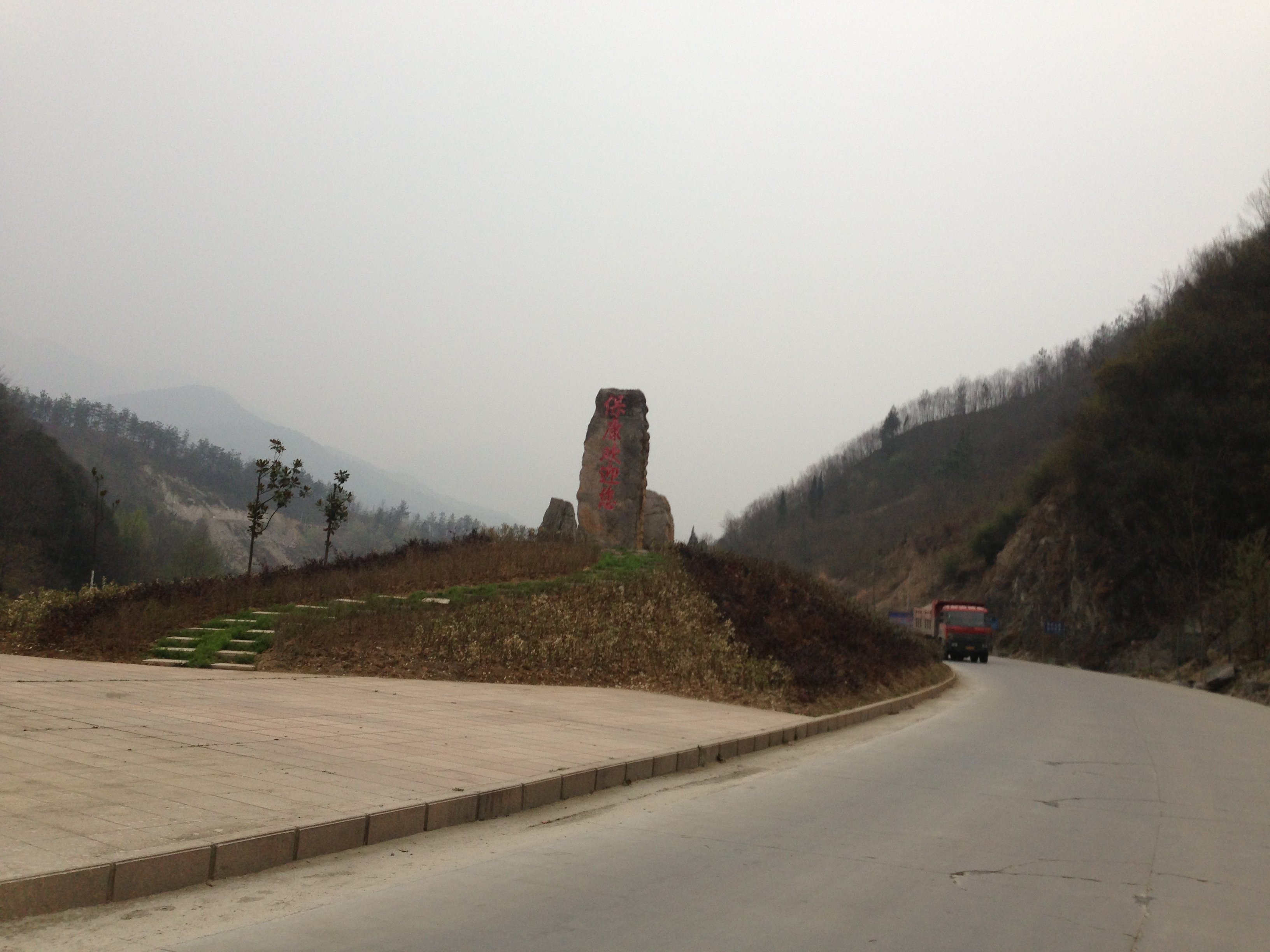 保康县